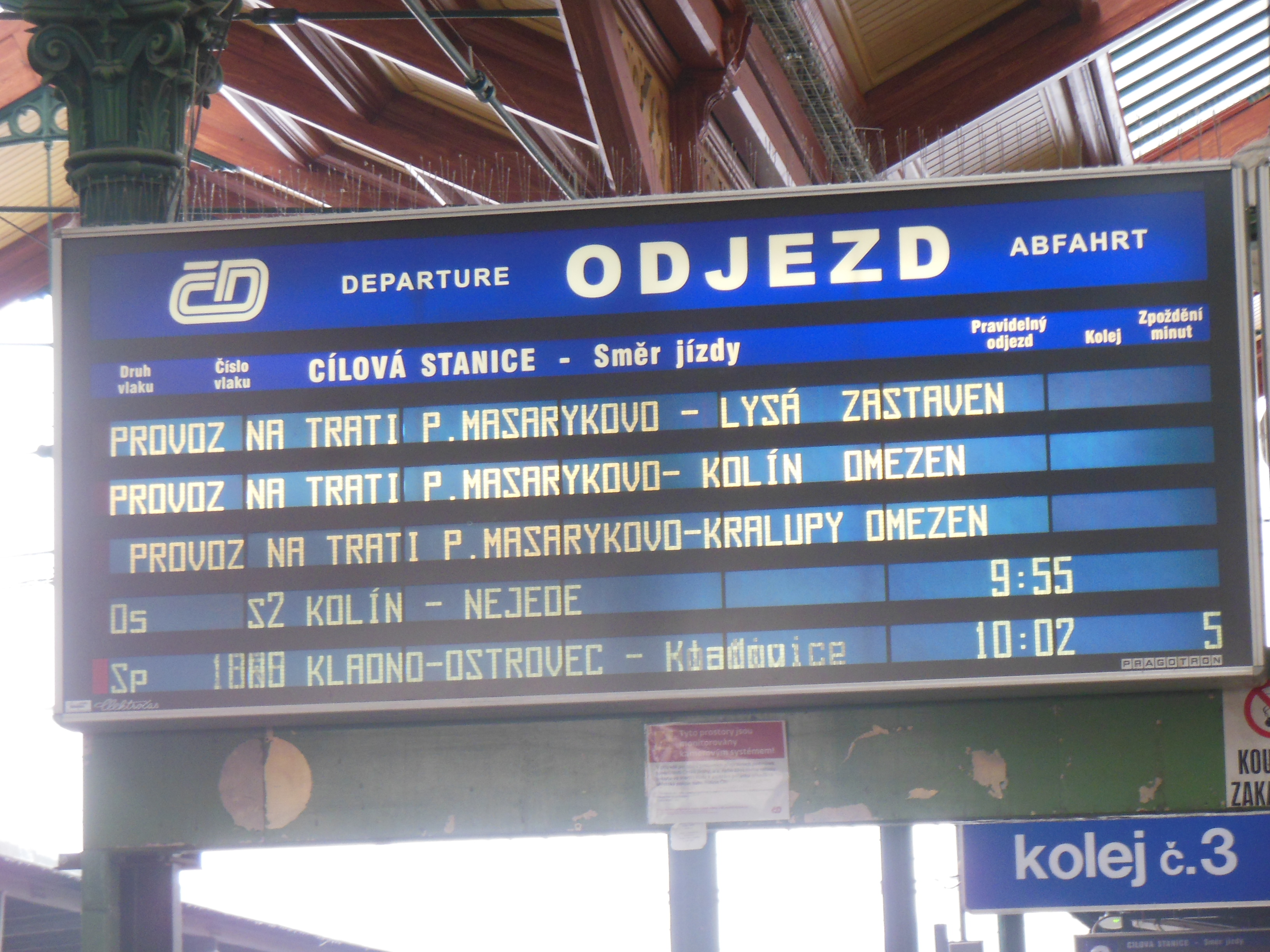 Praha-nové Město. Ledovková kalamita 2. prosince 2014, odjezdová tabule na pražském Masarykově nádraží.